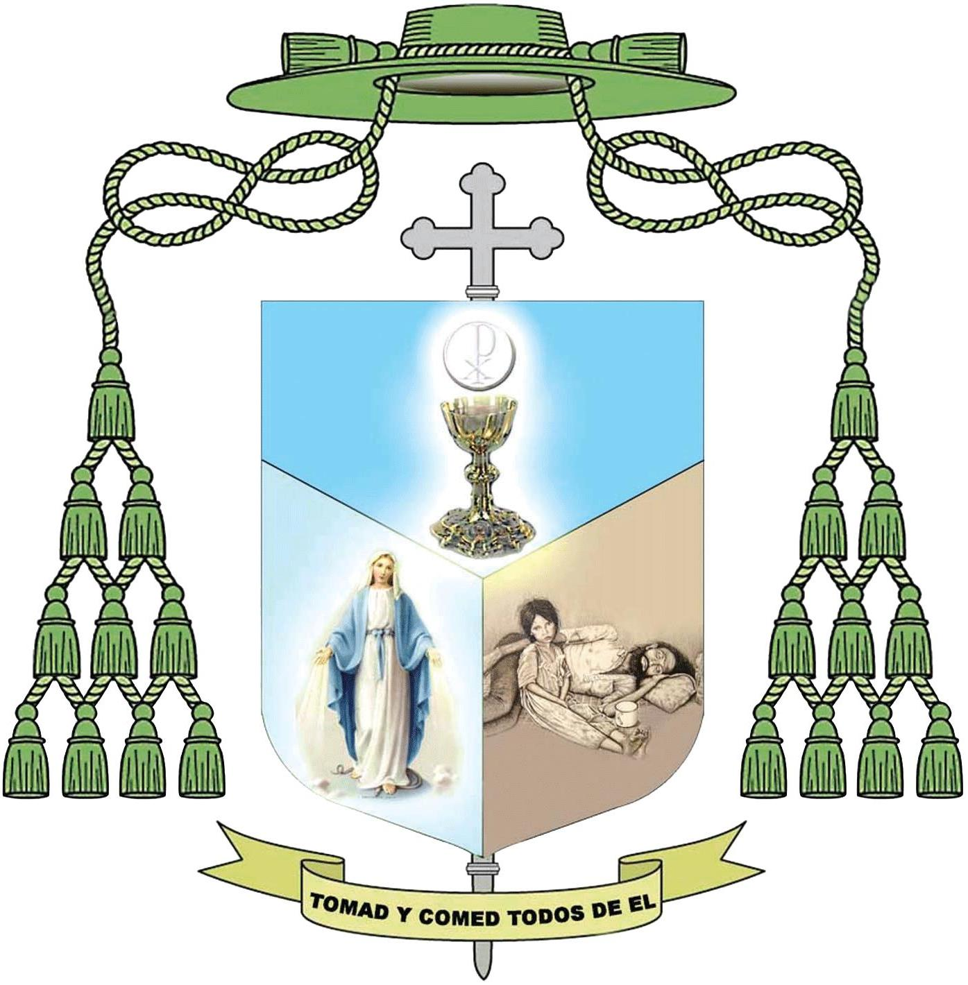 Insignia episcopal de la Arquidiócesis de San Salvador.